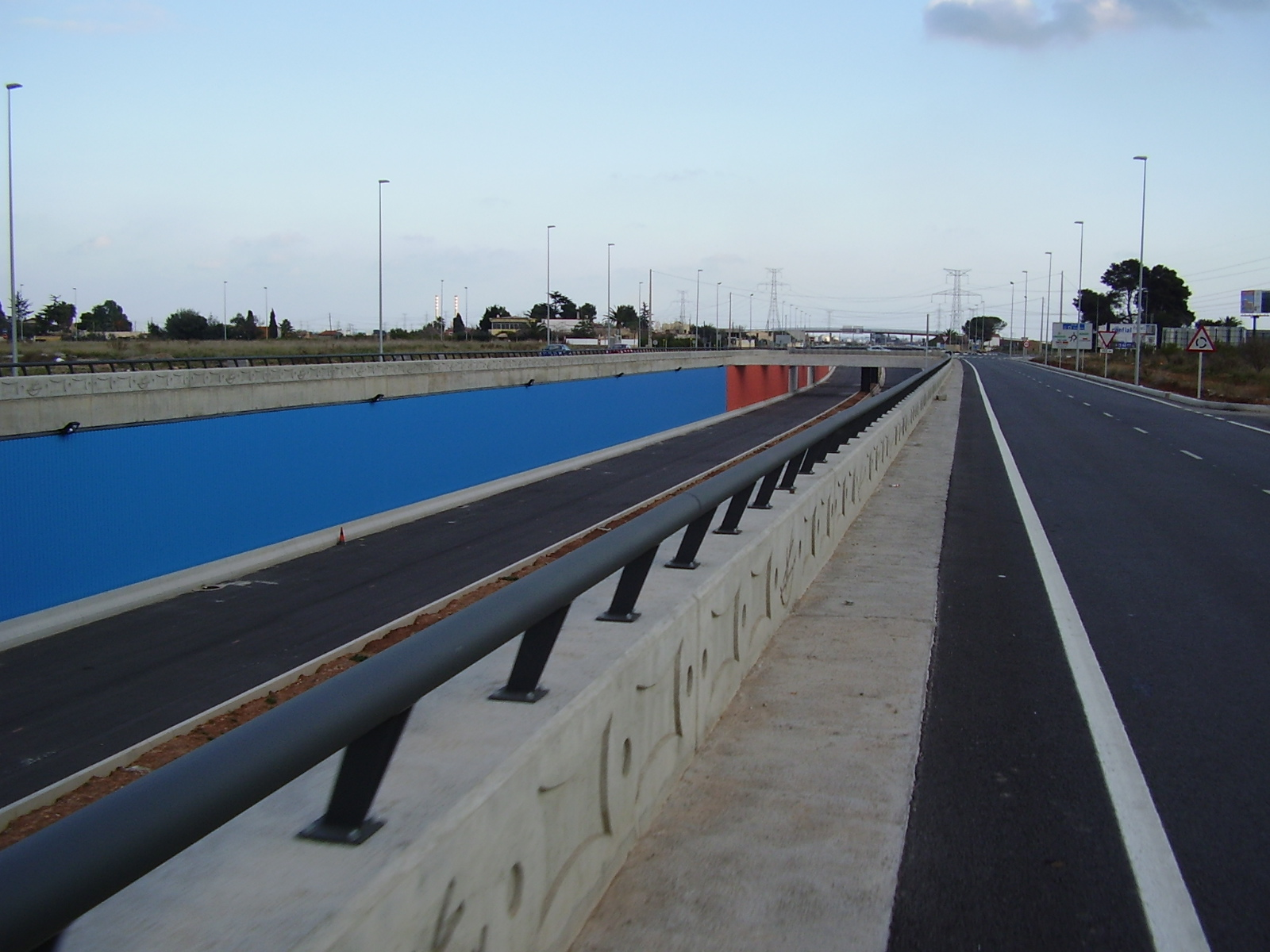 Imagen de la autovía CS-22 en Castellón de la Plana (España), tiempo antes de su apertura.